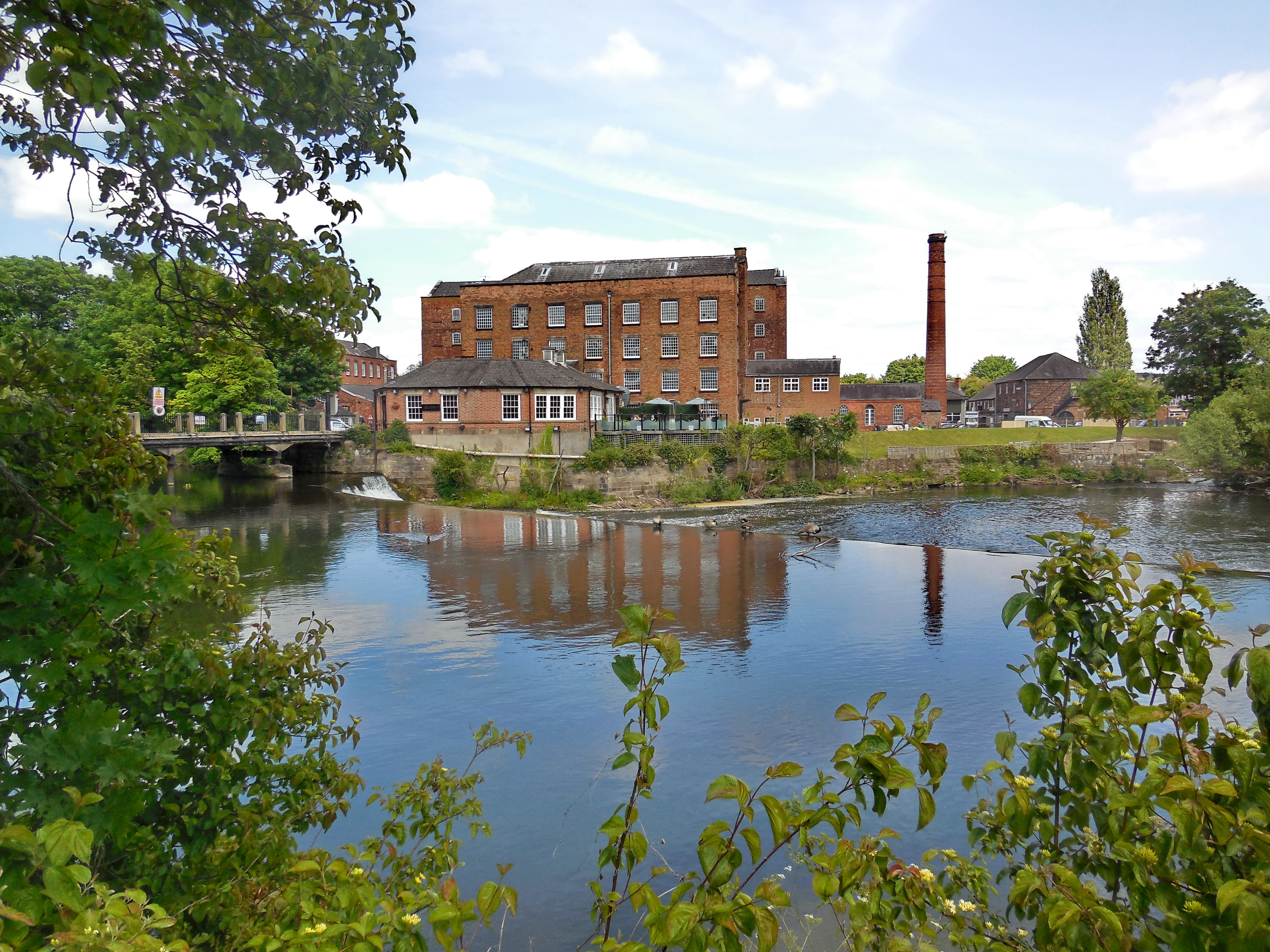 Darley Abbey